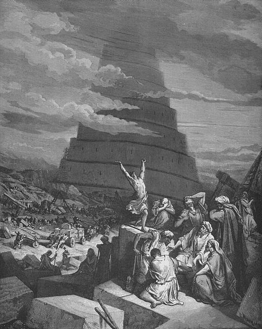 Gustave Doré (1832-1883), Bible, La tour de Babel.